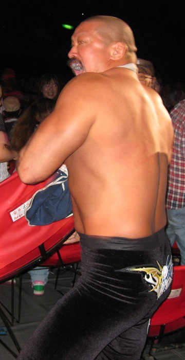 2011年6月18日 大阪大会 DOMINION6.18